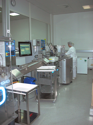 Pharmazeutische Industrie, Verpackungsraum